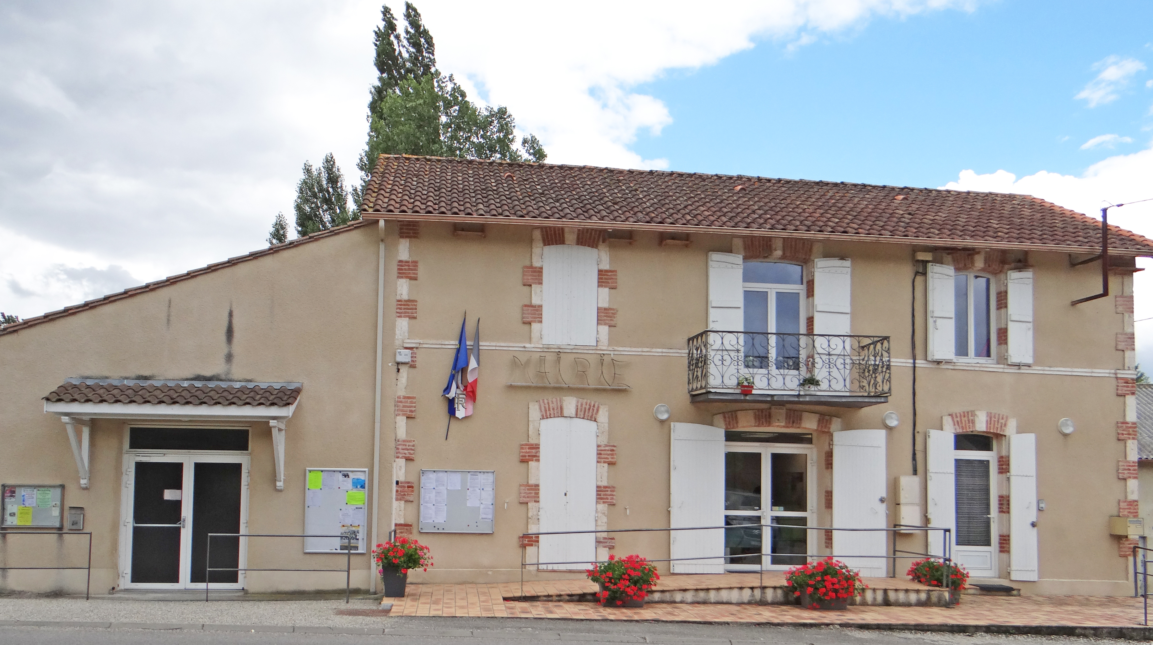 Auradou - Mairie